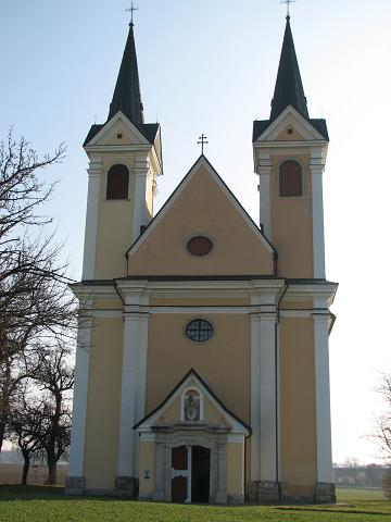 Wallfahrtskirche Heiligenkreuz (Nordansicht)